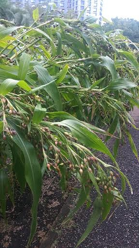 ハトムギ：ヨクイニン抽出用に薬草園で育てられている種